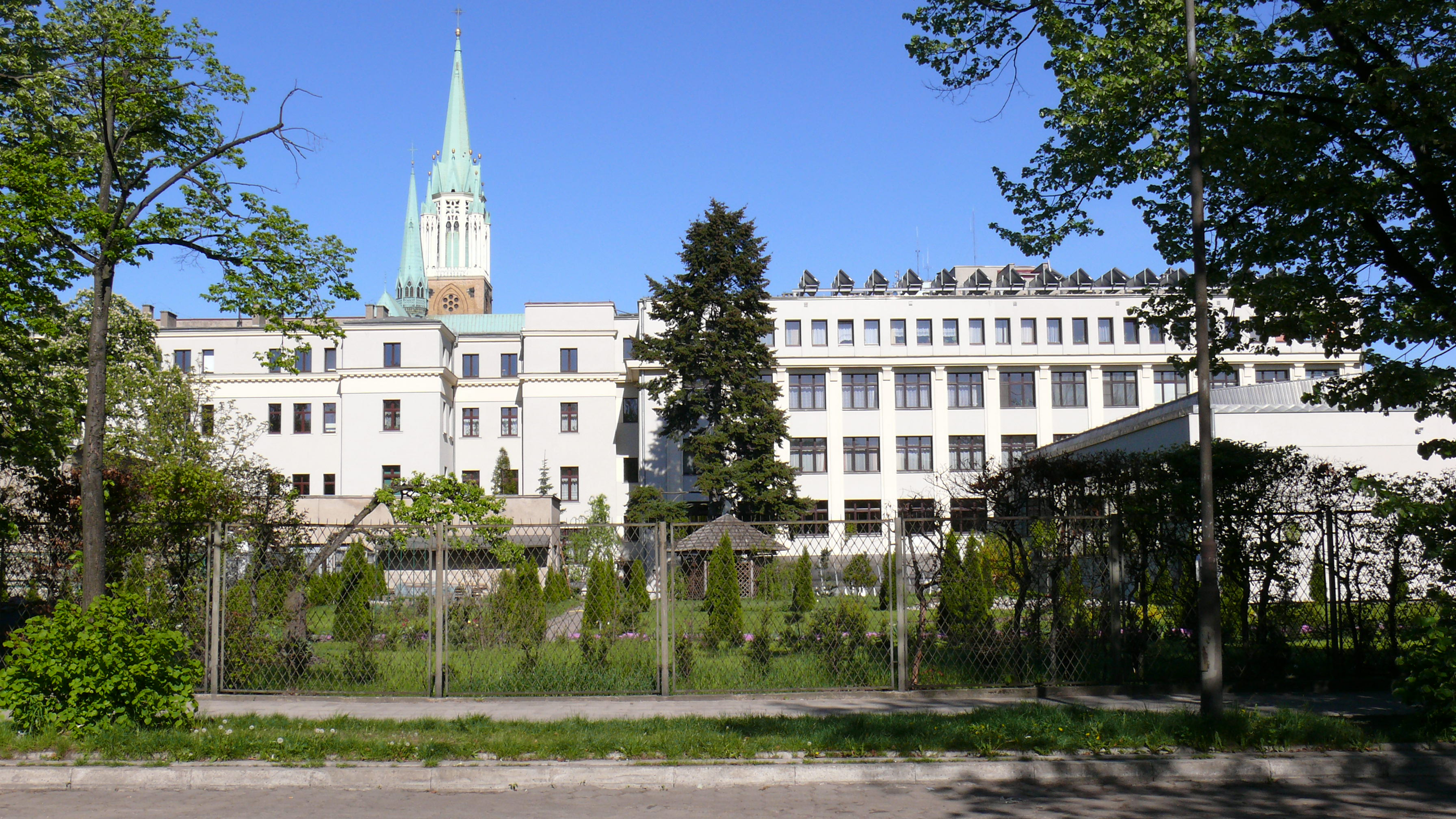 Wyższe Seminarium Duchowne w Łódź